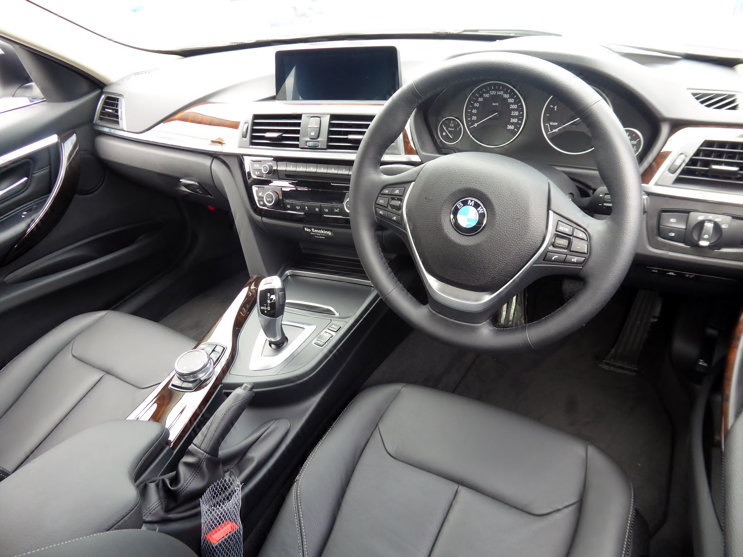 F30系BMW・320d Luxuryのインテリアを撮影。